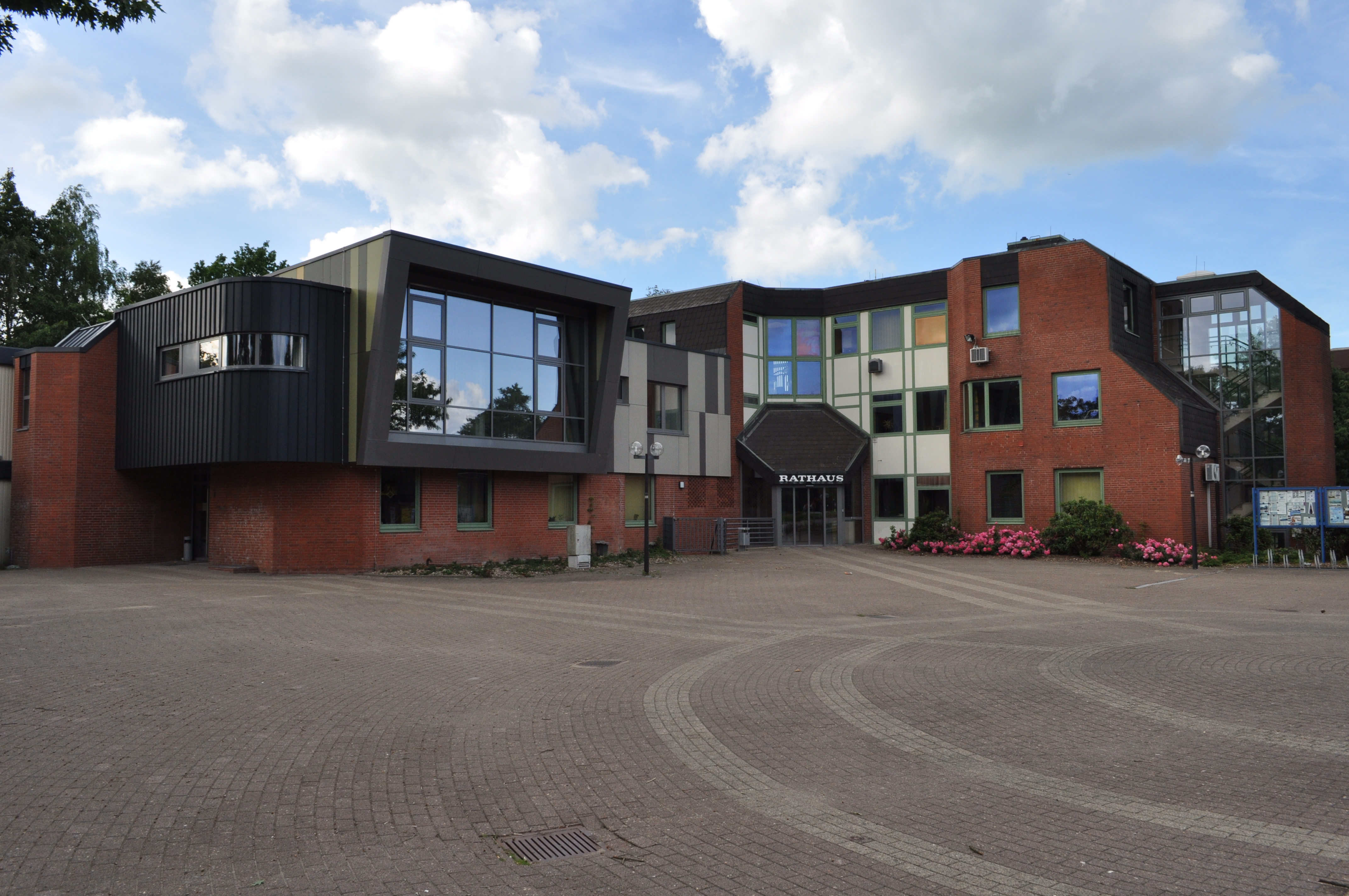 Rathaus der Stadt Hemmoor.